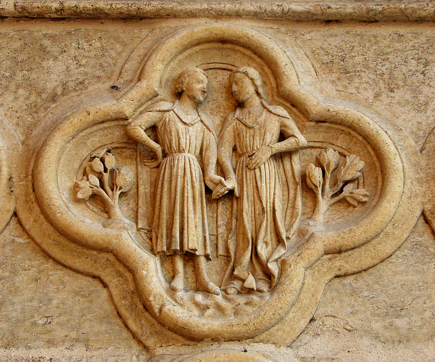 Les gémeaux (Gemini) ;un des signes du zodiaque complet figurant sur le portail gauche de la façade de la cathédrale d'Amiens.